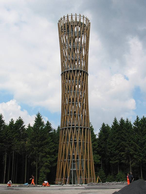 Lörmecke-Turm